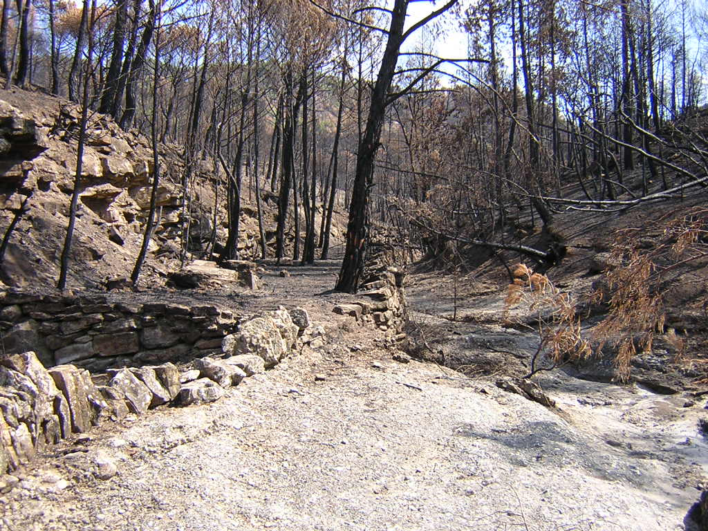 El torrent de la Baga de l'Om (Monistrol de Calders, Moianès)